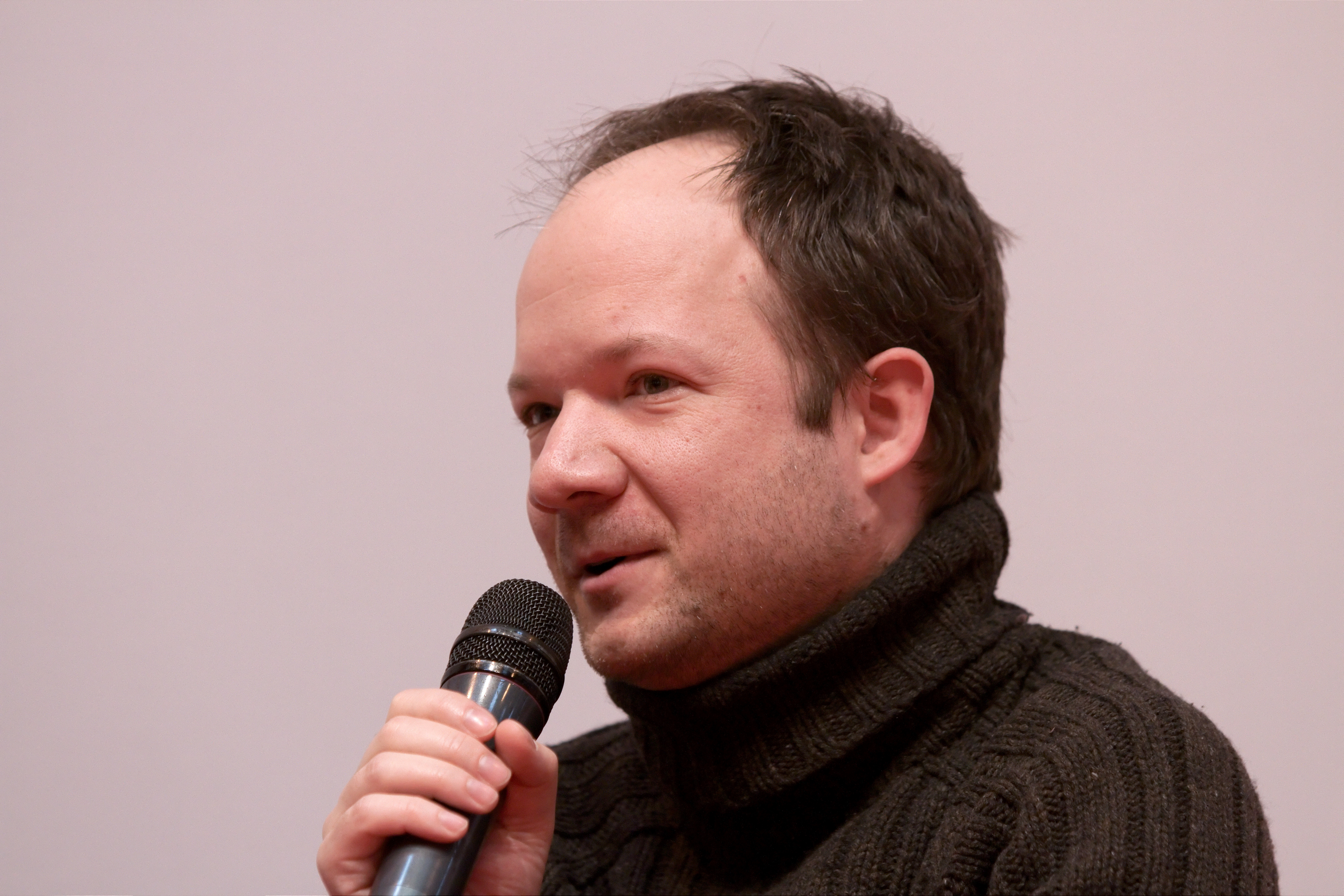 Mathieu Sapin lors du Salon du livre de Paris pour un débat autour des jeunes auteurs de la collection Poisson Pilote.